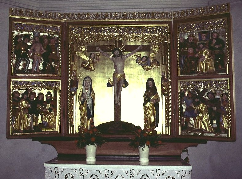 Hasle Kirke i Danmark. Altertavle